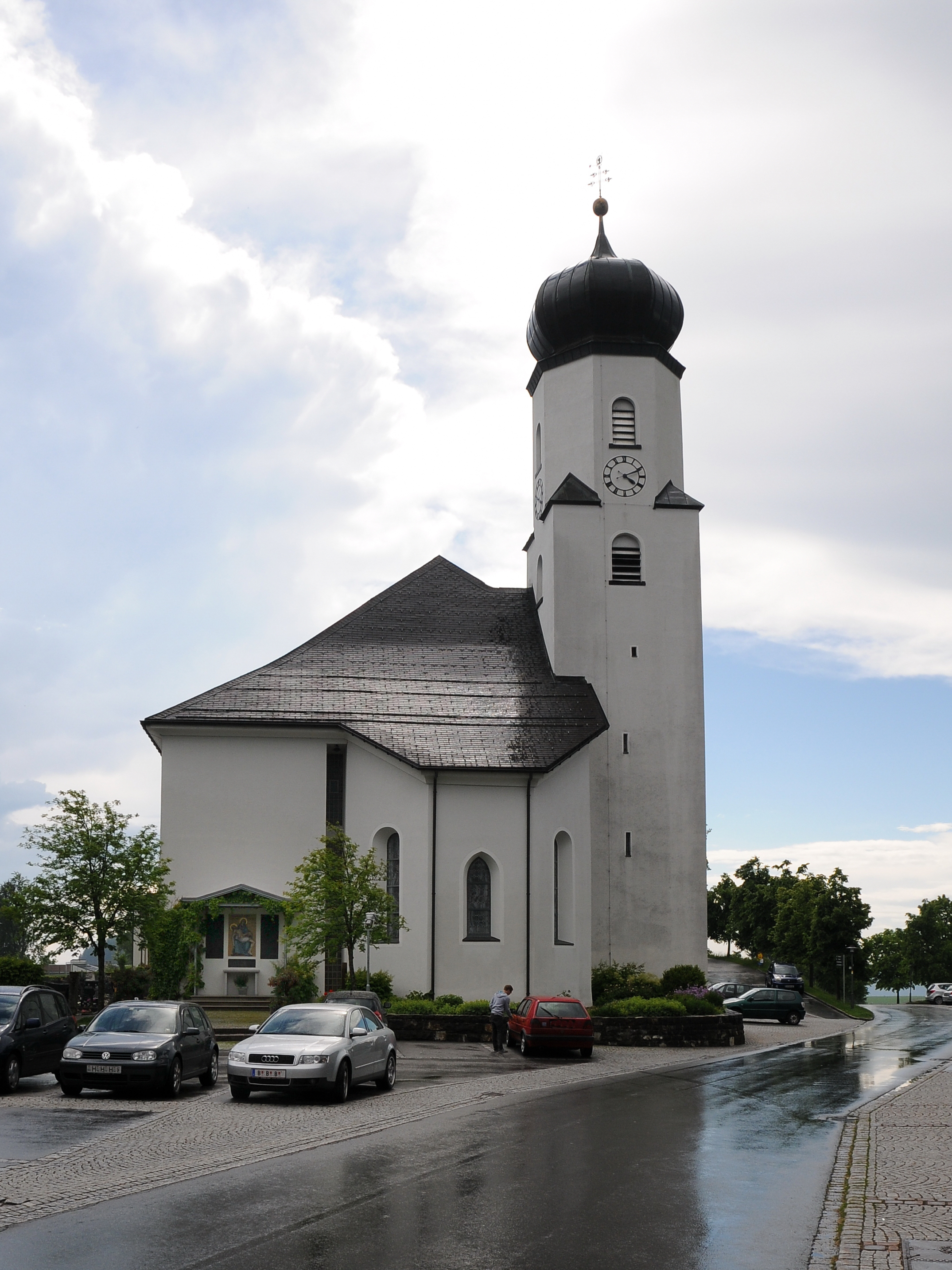 Pfarrkirche hl. Laurentius in Sulzberg, Vorarlberg. aus dem DEHIO Vorarlberg 1983: Umbau und Neubau des Langhauses 1828/29 nach Plänen von Alois Negrelli , Weihe 1833.